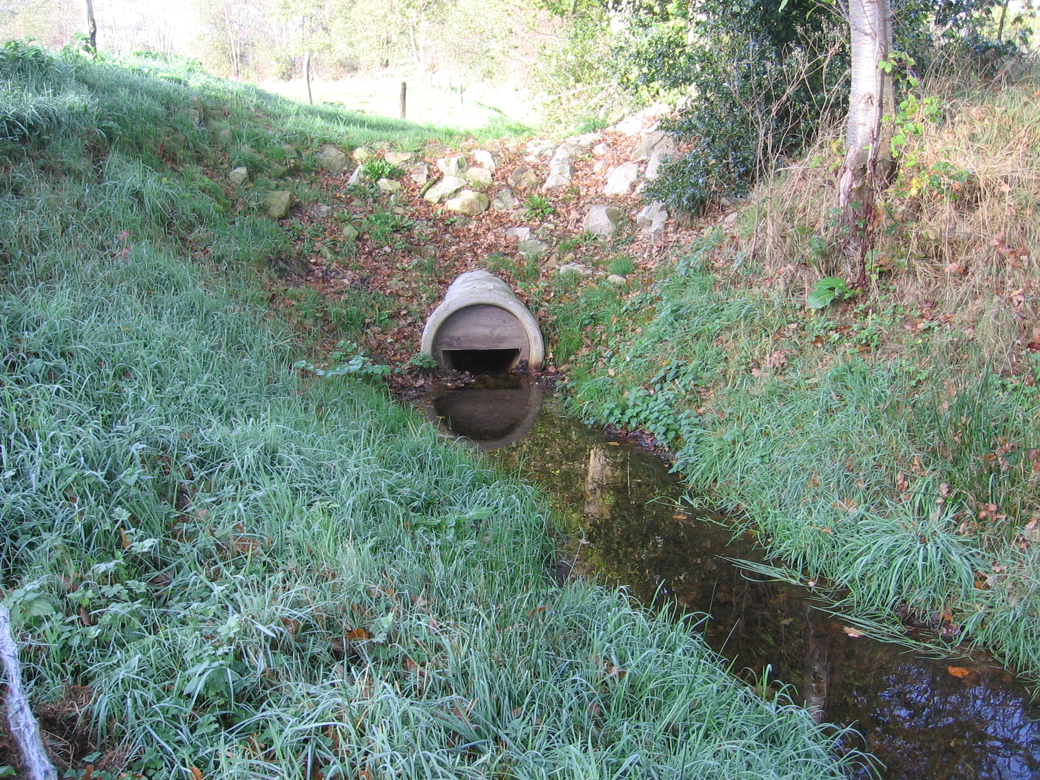 Dit is een foto van de knijpduiker van het retentiegebied Hambroekermaten. Ik heb deze foto zelf gemaakt op 10 Februarie 2009.